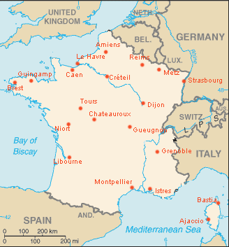 Localisation des villes du championnat de France de football D2 2006-2007.